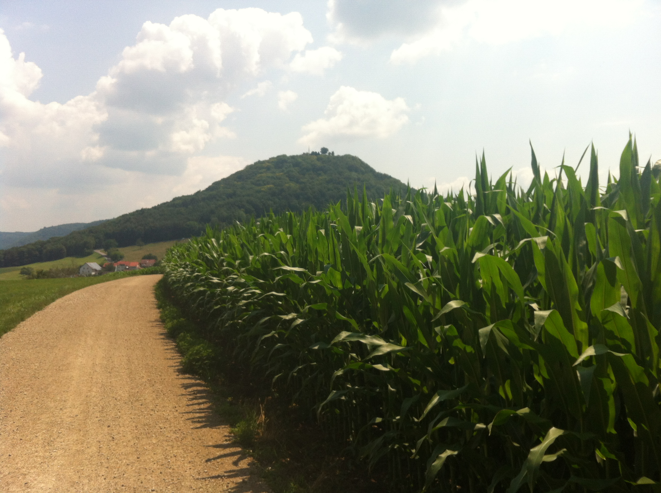 Ruine Küssaburg in Küssaberg im Landkreis Waldshut in Baden-Württemberg. Blick von Westen, im Vordergrund die vermutete Römerstraße von Bechtersbohl zum Legionslager Dangstetten.